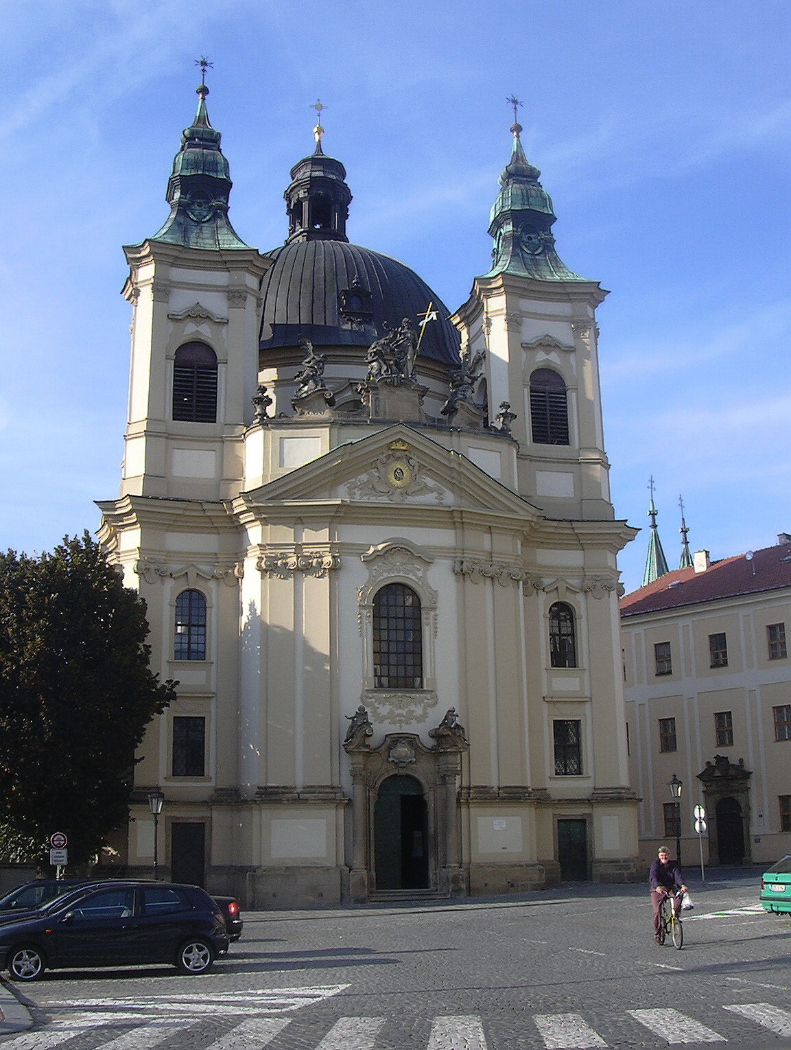 Kostel svatého Jana Křtitele v Kroměříži